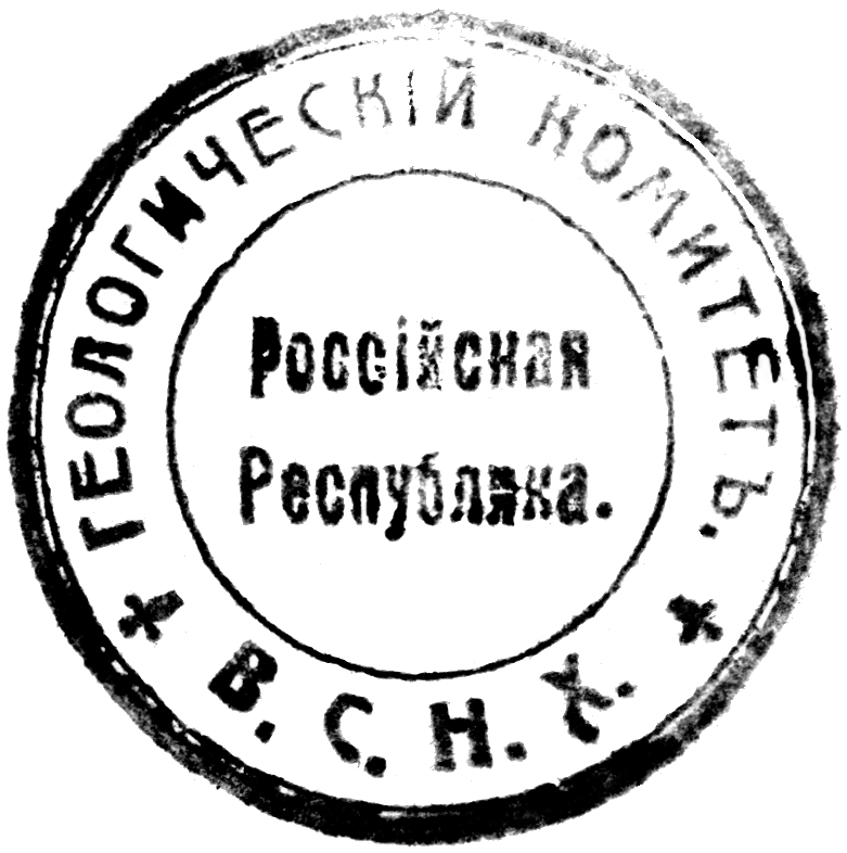 Печать Геологического комитета Российской республики